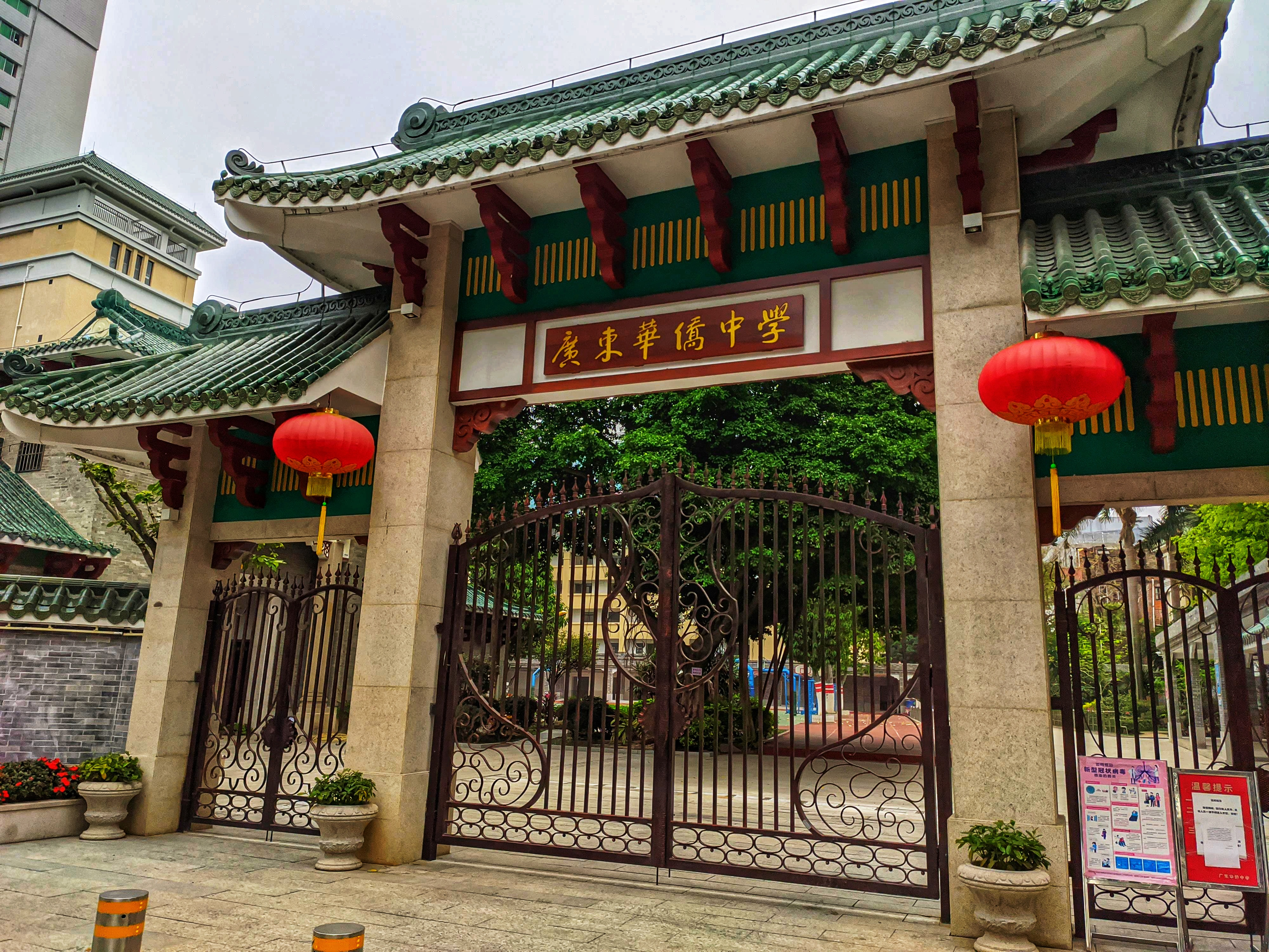 廣東華僑中學 中文（中国大陆）: 广东华侨中学